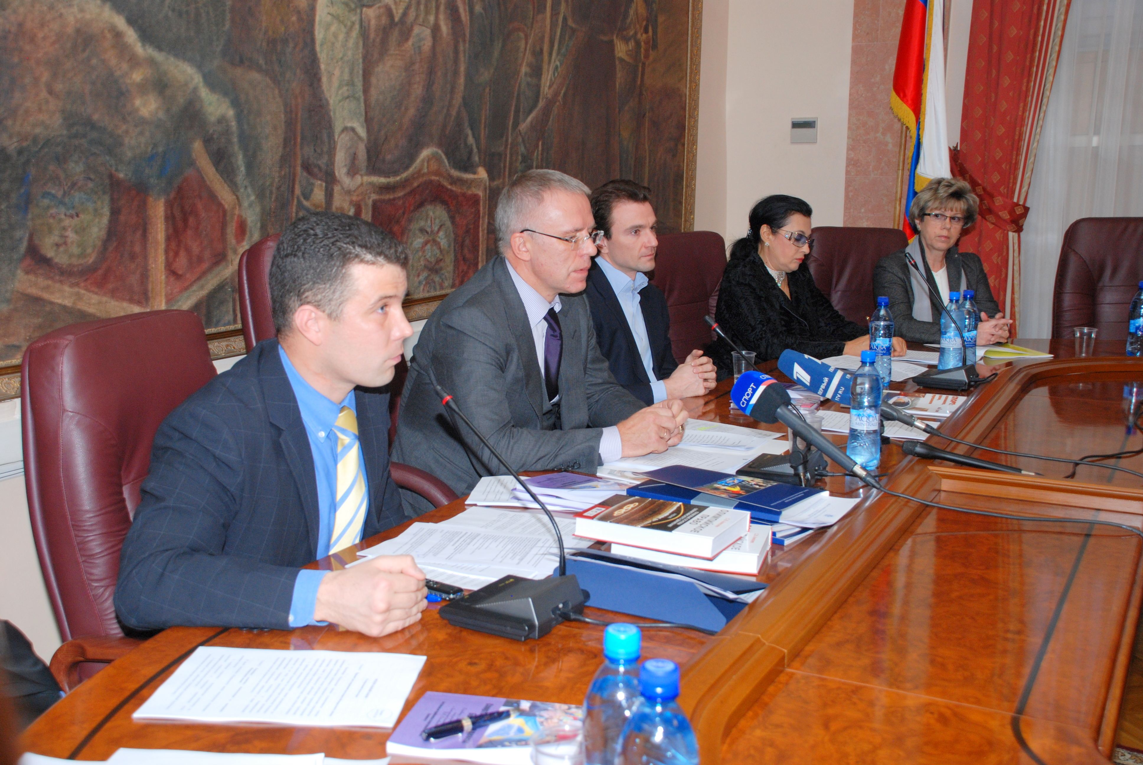 Заседание Комиссии по спортивному праву Ассоциации юристов России